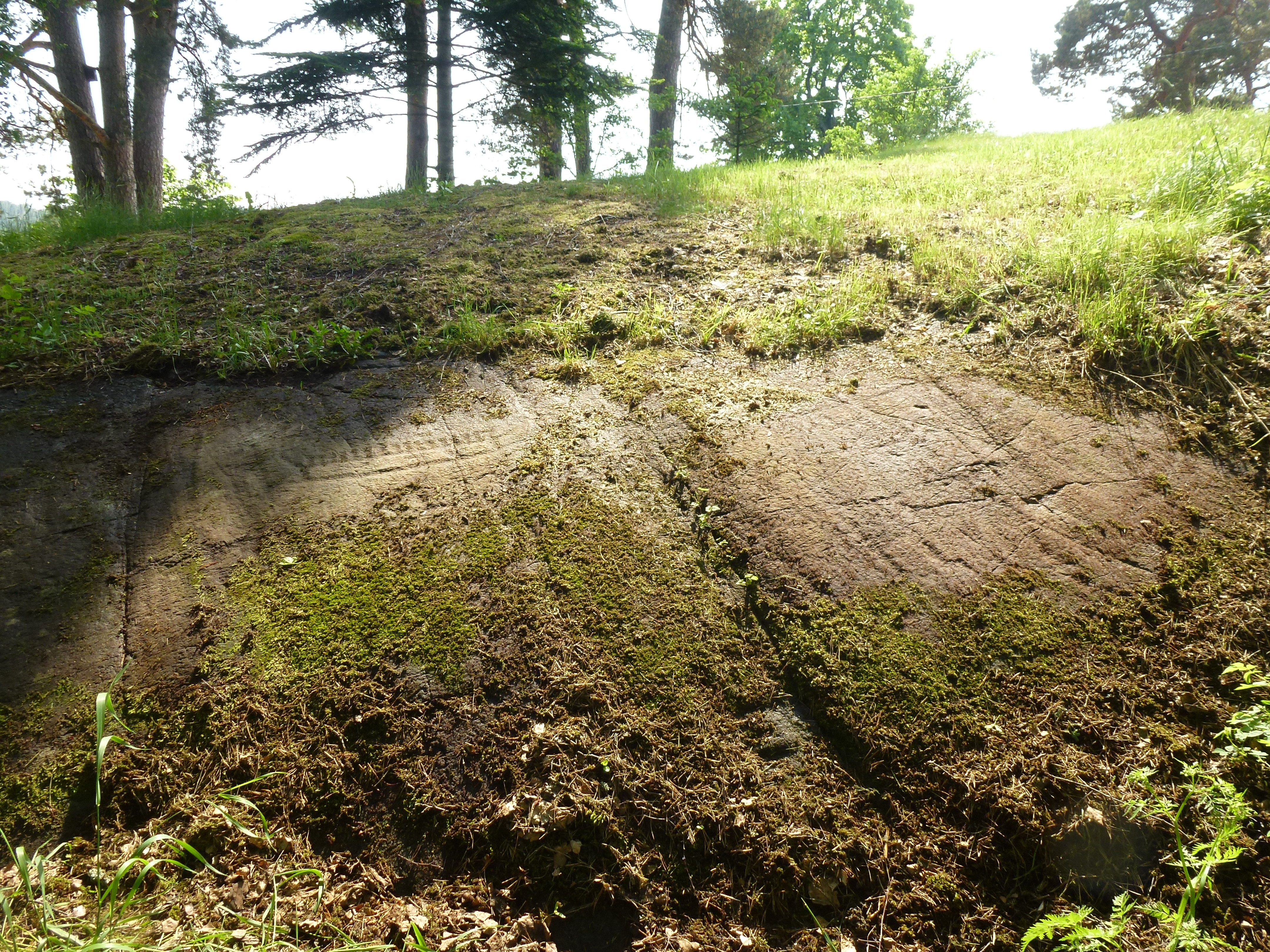 Ladviks hällristning (RAÄ-nummer Salem 98:1)